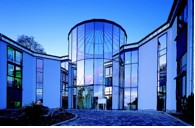 Ibs AG Hoehr Grenzhausen Frontansicht